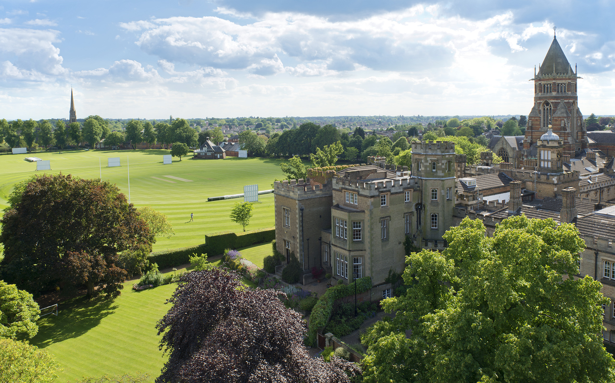 ラグビー校のスクールハウス(寮のひとつ)